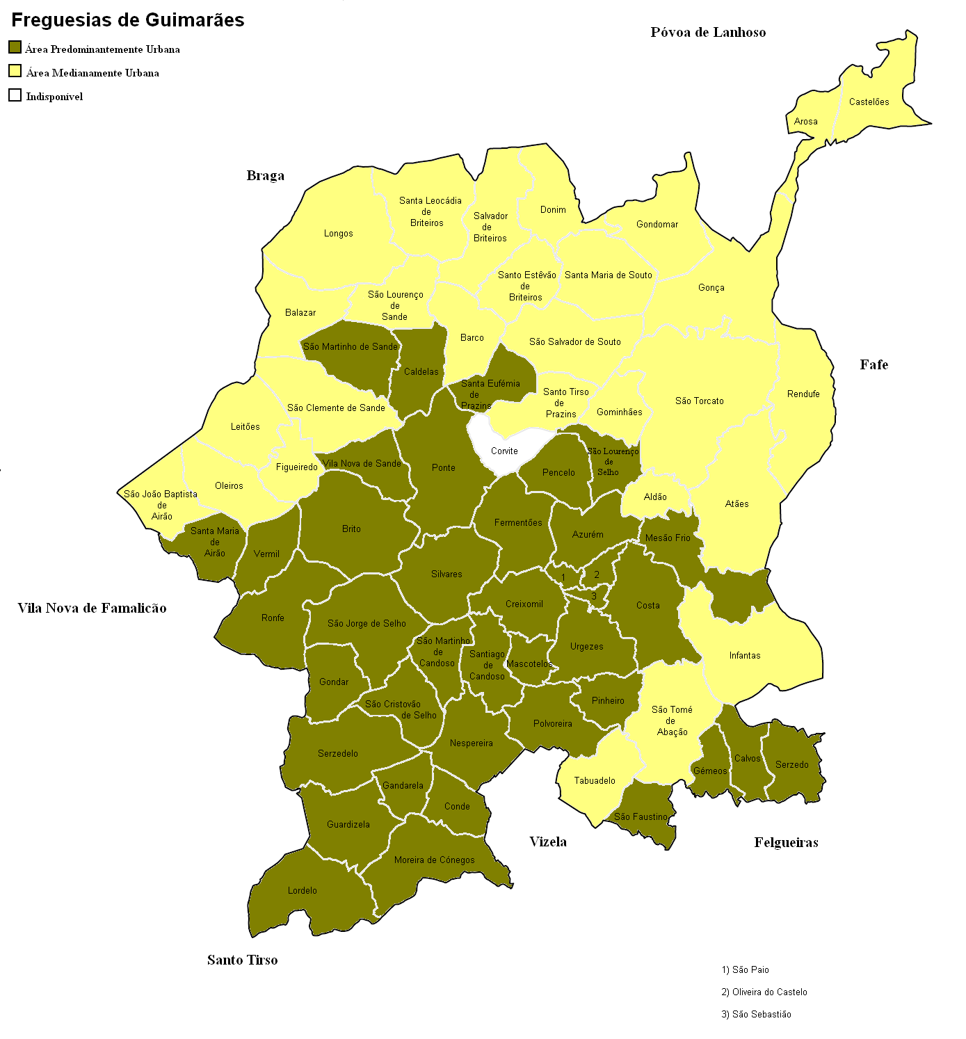 Mapa das freguesias com tipologia urbana, concelho de Guimarães, Portugal